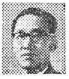 Kim Hyun-chul